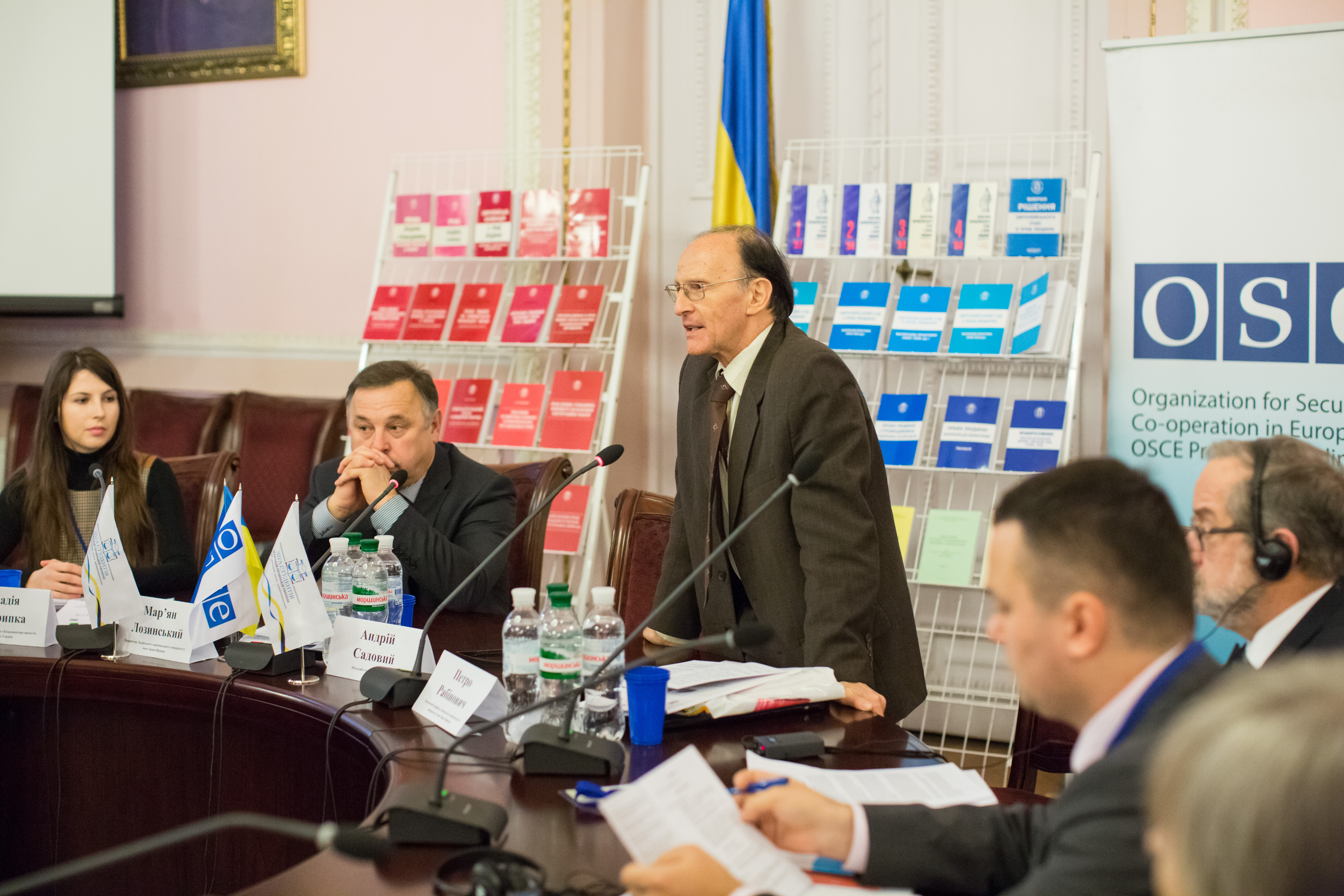 Професор Петро Рабінович - відкриття конференції